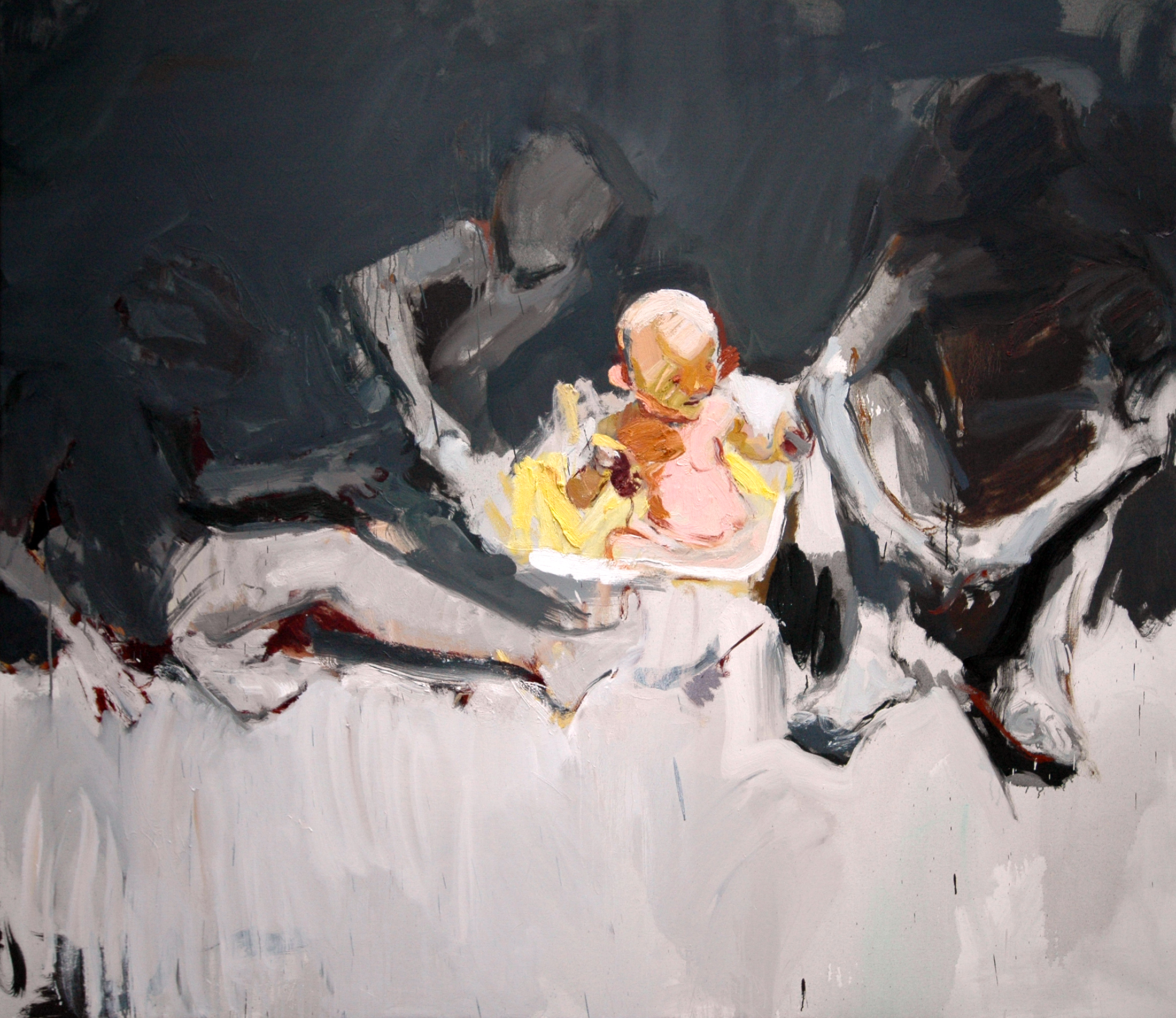 В. Семенский. «Берег.Семья», 2011. Холст, масло, 165х200 см